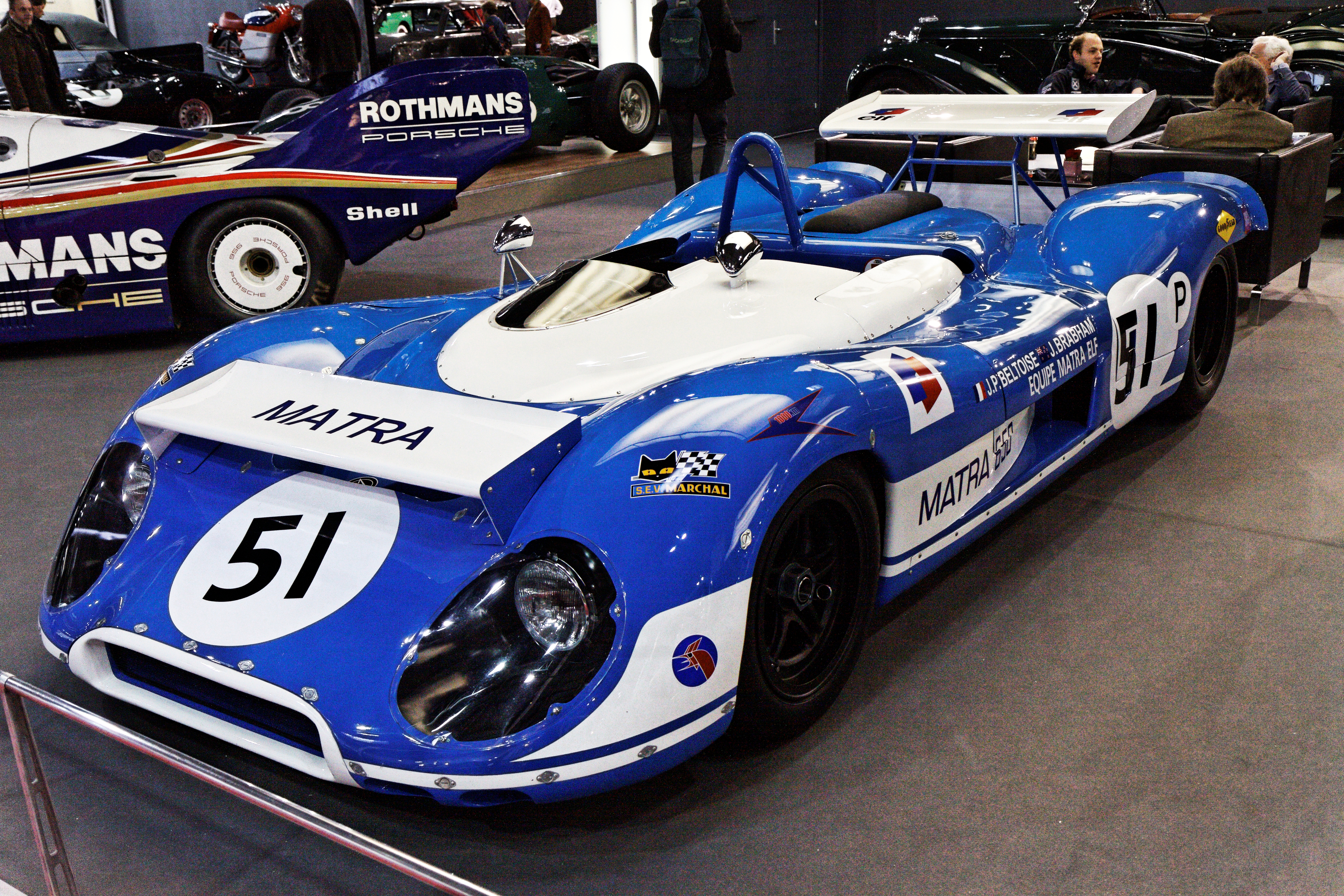 Une Matra MS 650 présentée lors du salon Retromobile 2013.